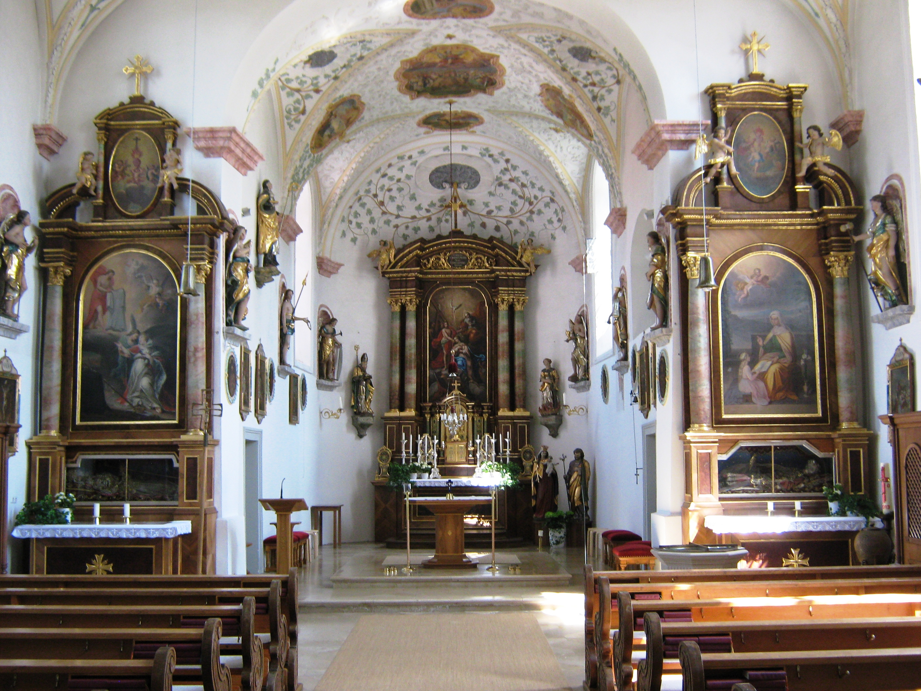 Innenraum der Kirche